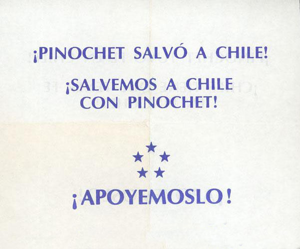 ¡Pinochet salvó a Chile! ¡Salvemos a Chile con Pinochet! ¡Ayudemoslo!. Panfletos del período de la dictadura militar (1973-1988)